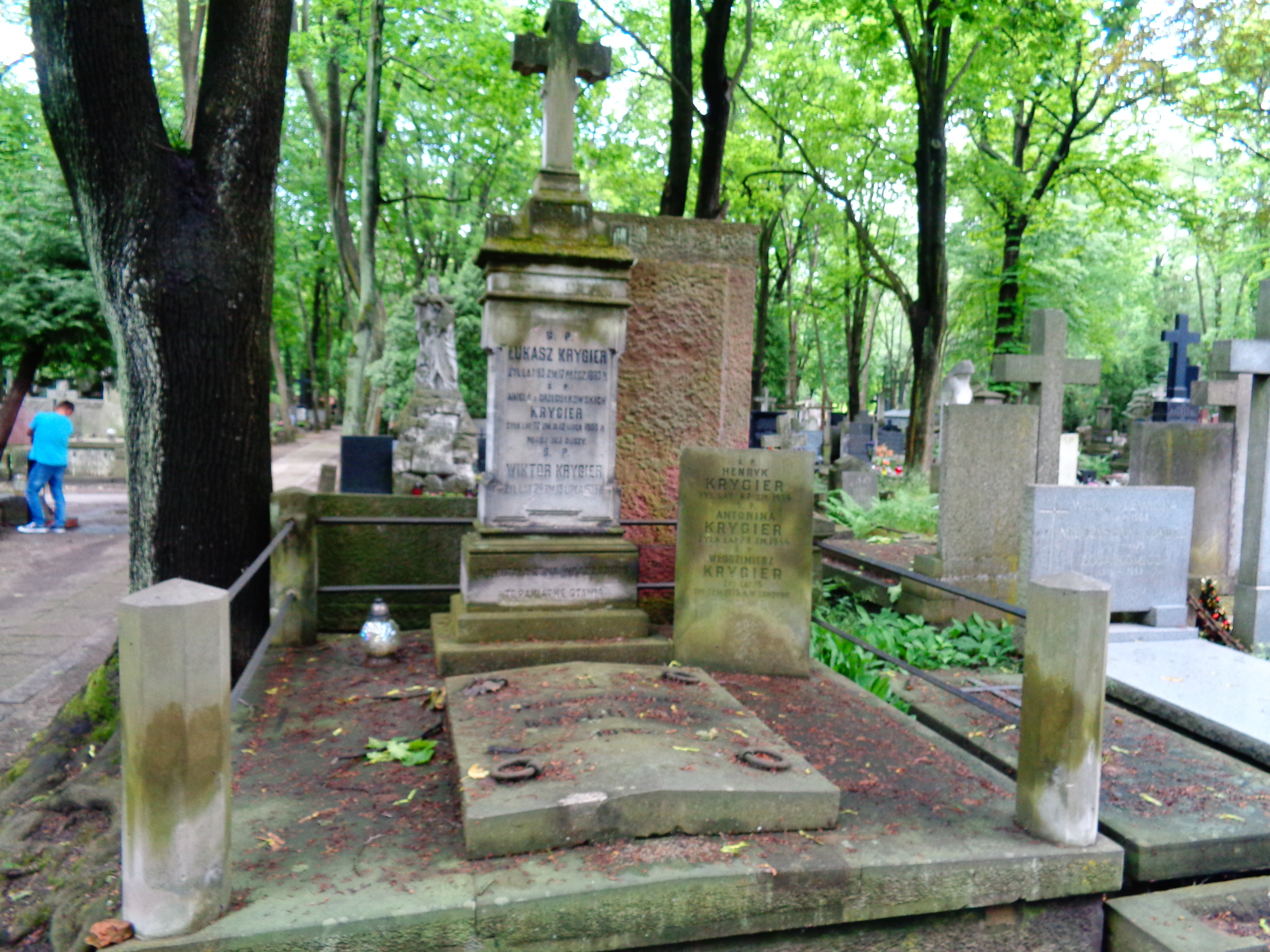 Grób Włodzimierza Krygiera na Cmentarzu Powązkowskim